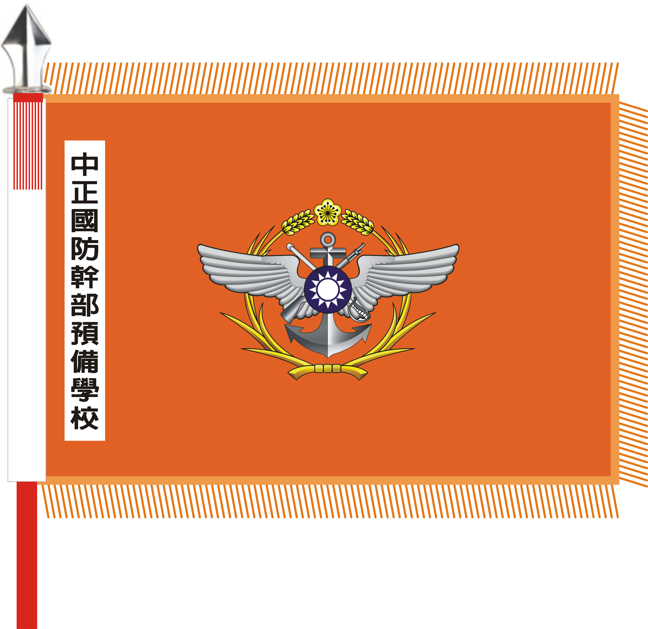 中正國防幹部預備學校校旗